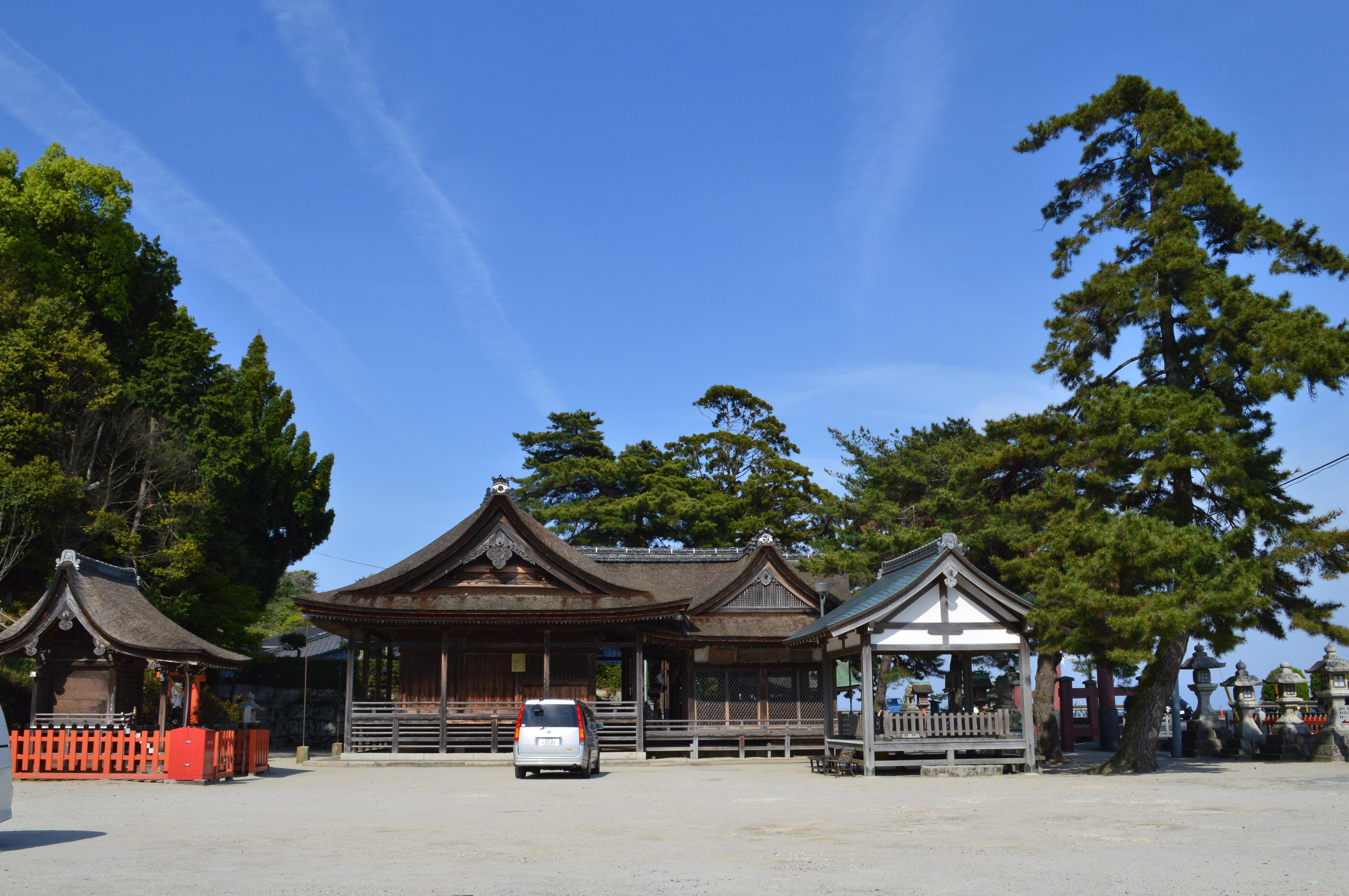 白鬚神社 (高島市) 境内